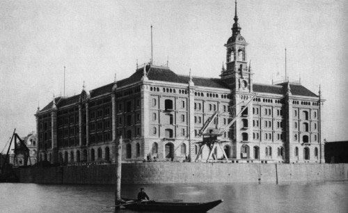 Fotografie des alten Speichergebäudes im Mainzer Zollhafens mit der Hafenanlage in Mainz von 1890, abgebrochen 1968.